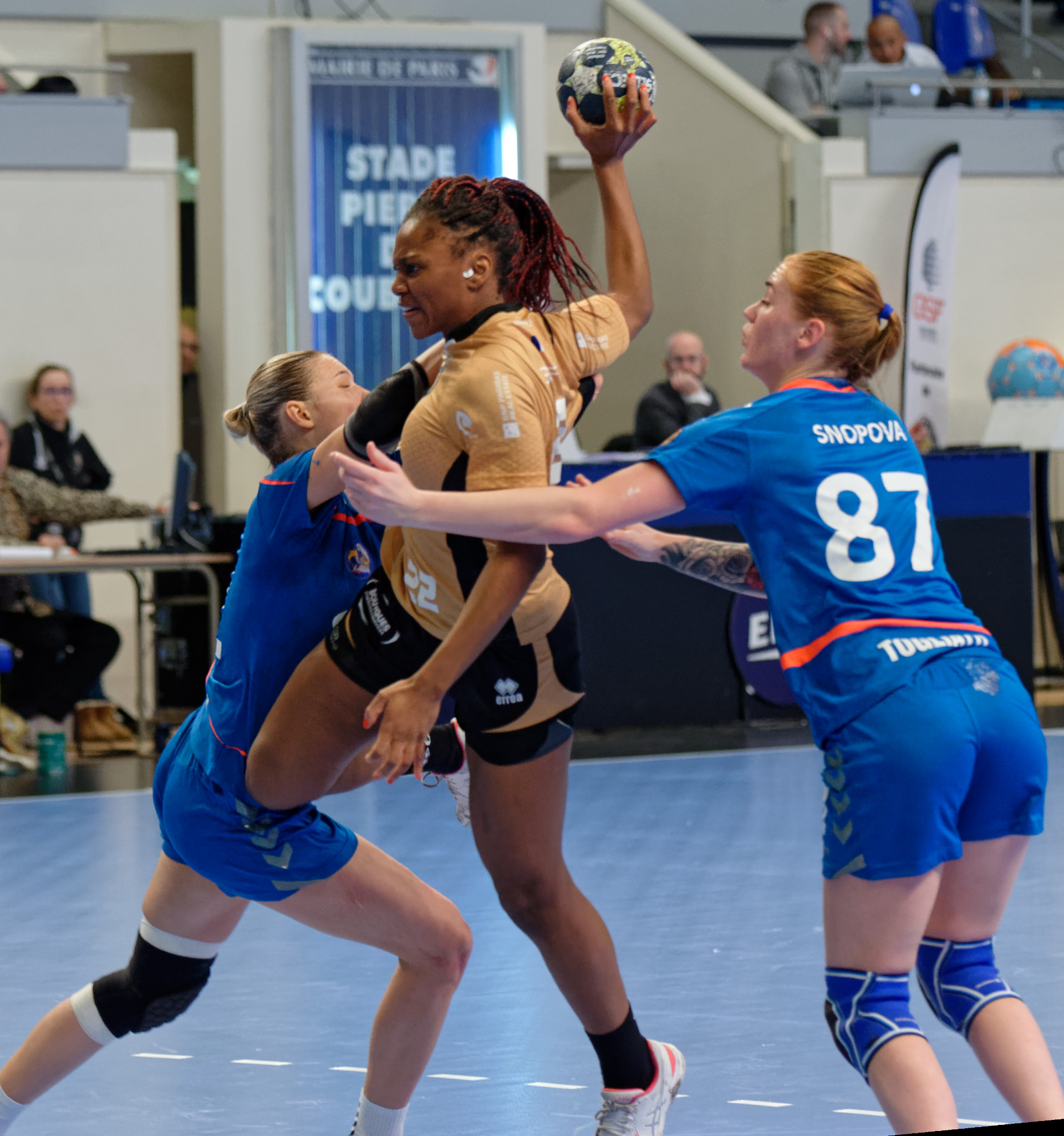 Match de coupe EHF entre Issy Paris Hand et les russes de Lada Togliatti. A Coubertin, le 12 janvier 2018.